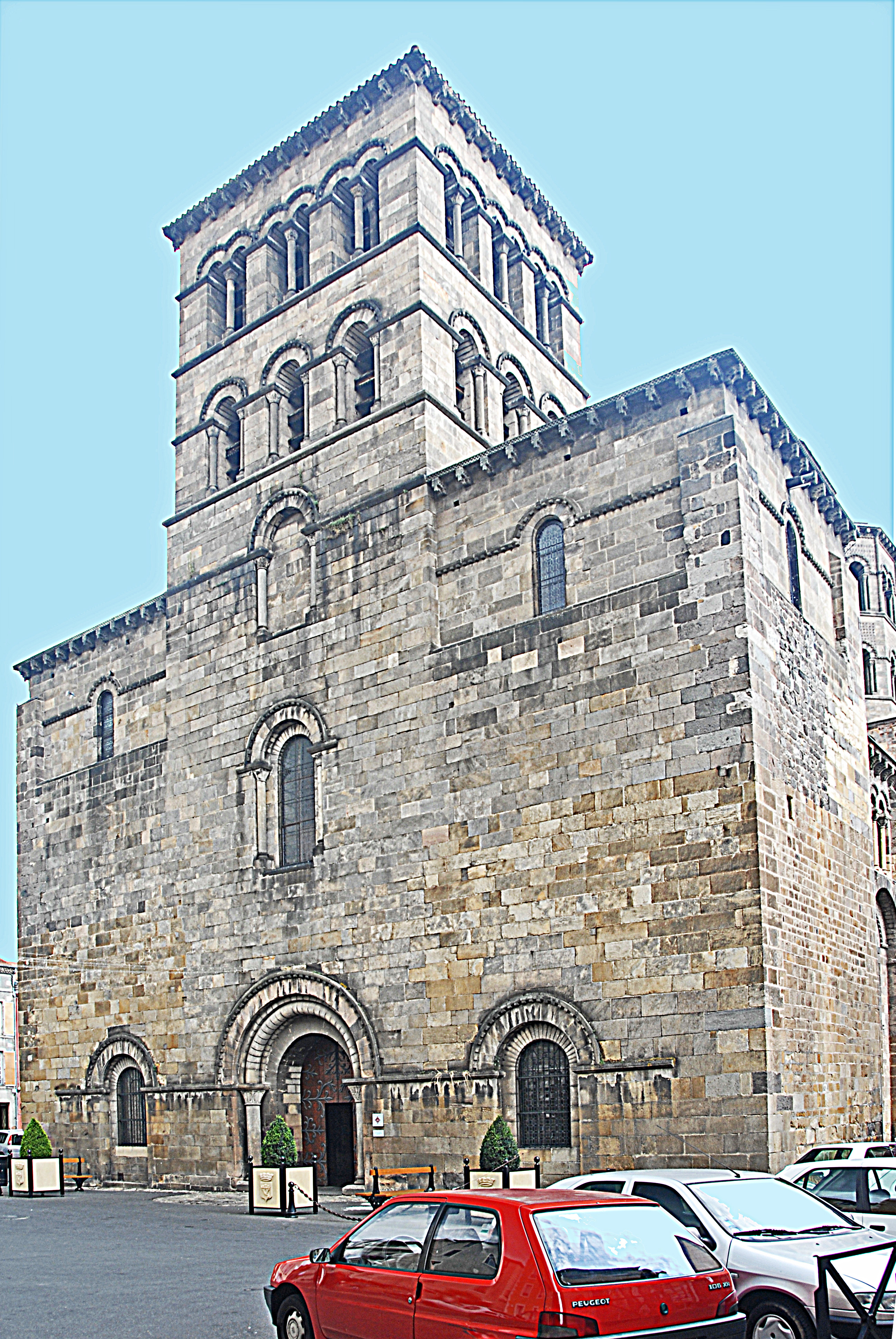 Westwerk-Fassade von SW